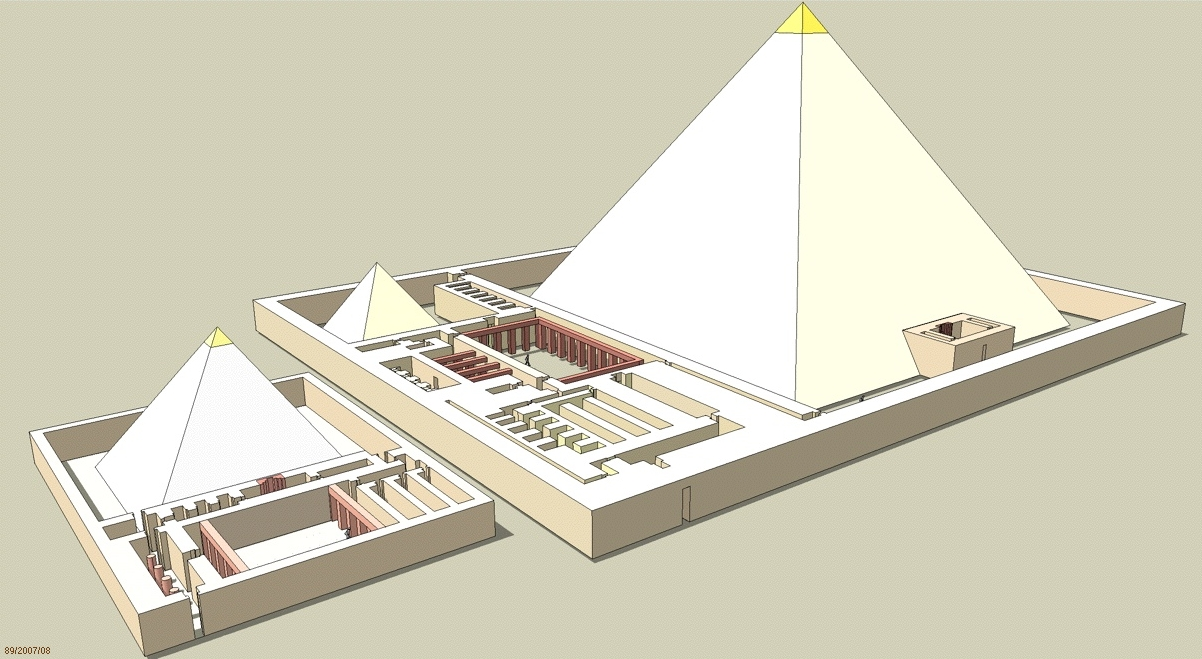 Essai d'élévation des complexes funéraires d'Ouserkaf et de Néferhétepès à Saqqarah - Ve dynastie égyptienne